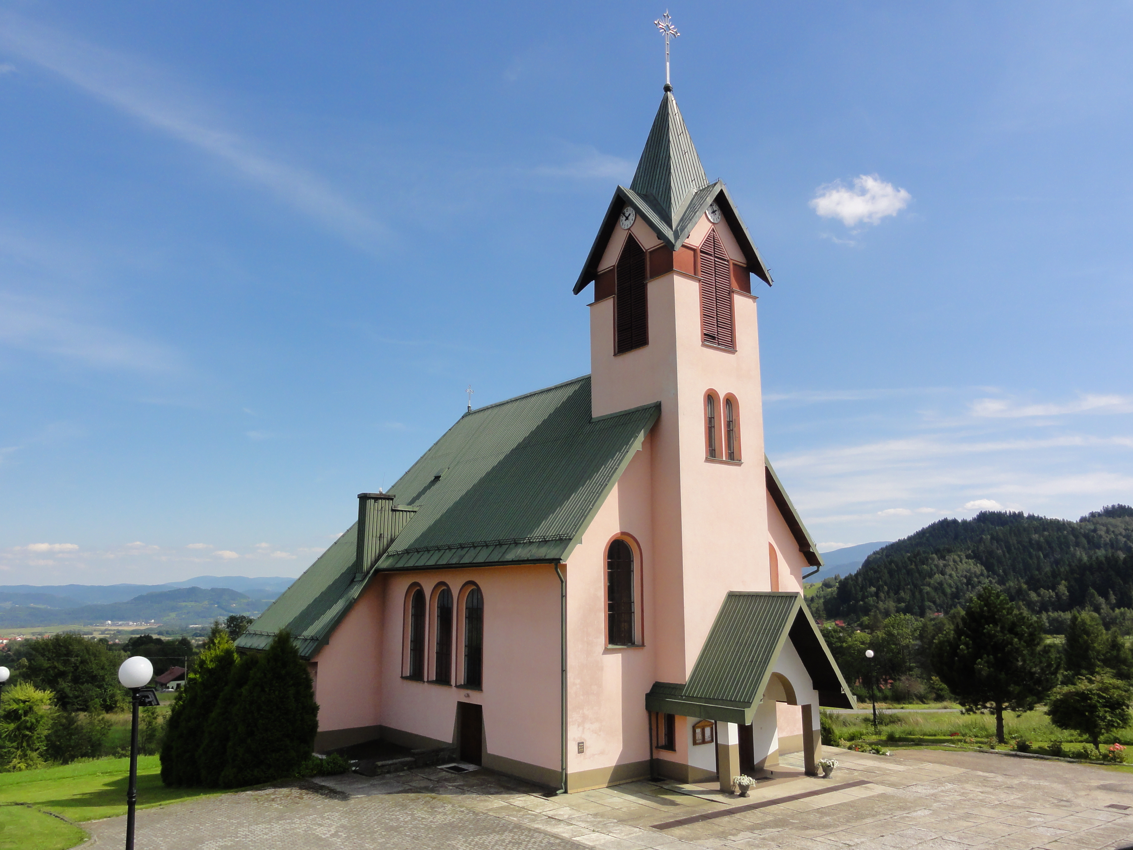 Kościół Matki Bożej Różańcowej w Ostrem